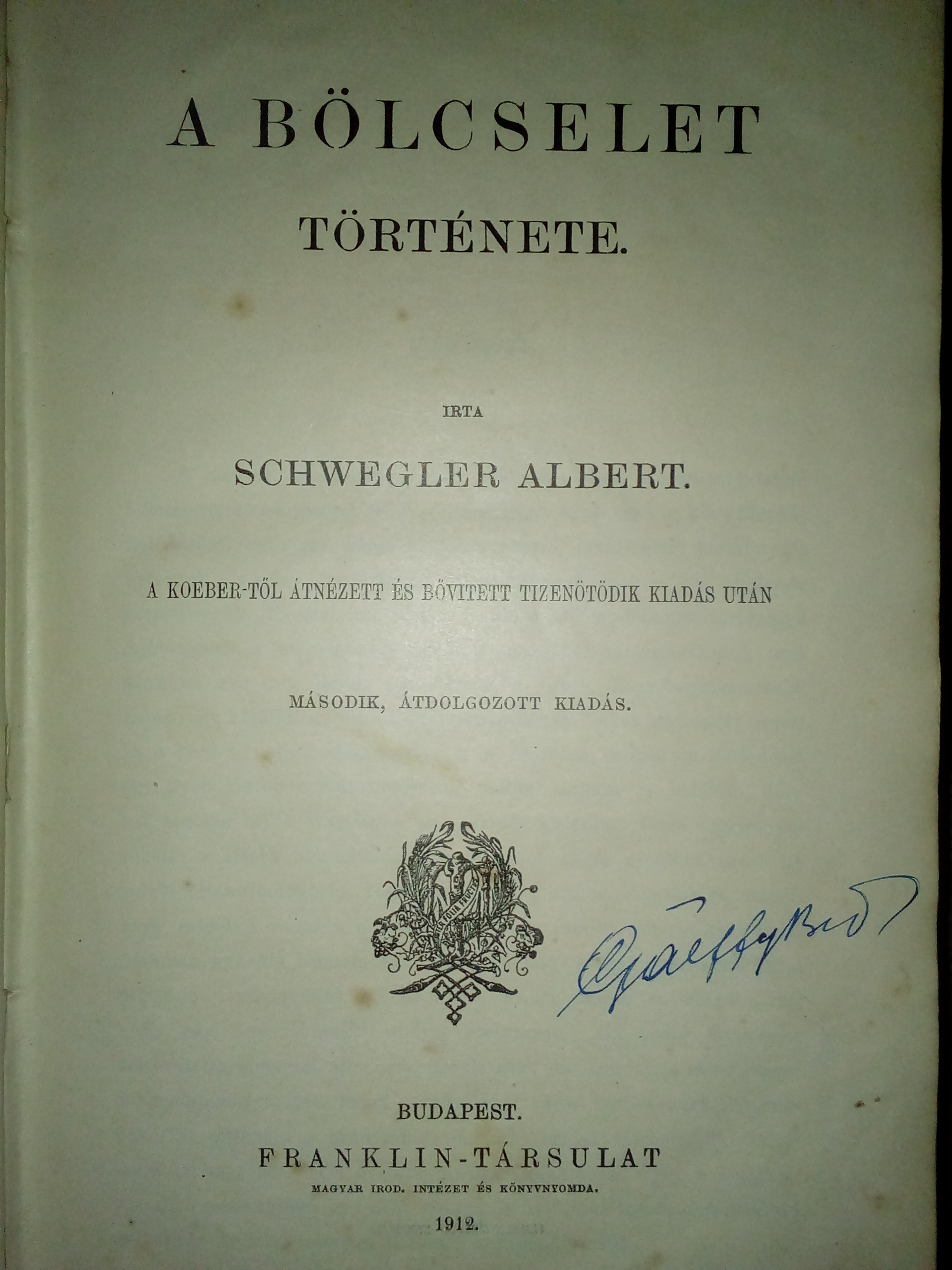 Az adott mű címlapja.